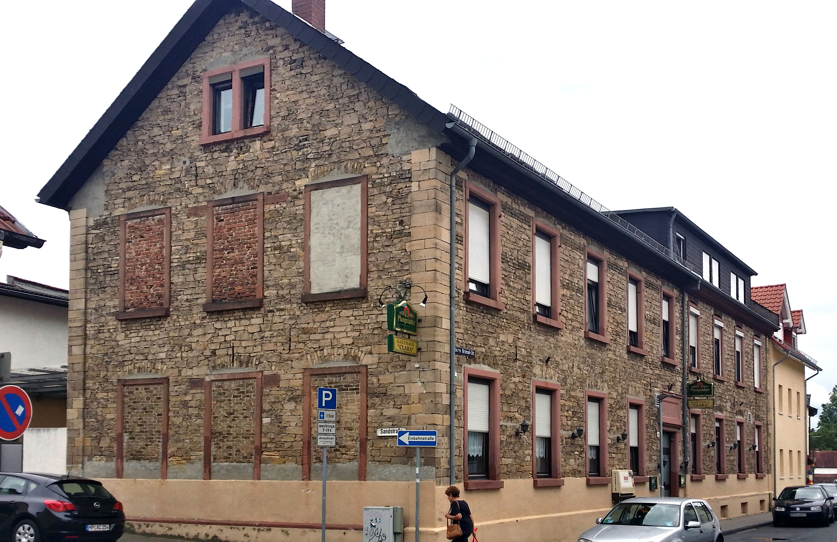 Gewerbeverein - eigenes Schulhaus in der oberen Grieselstraße. Am 31. Oktober 1886 feierlich eröffnet. 1895 erweitert.